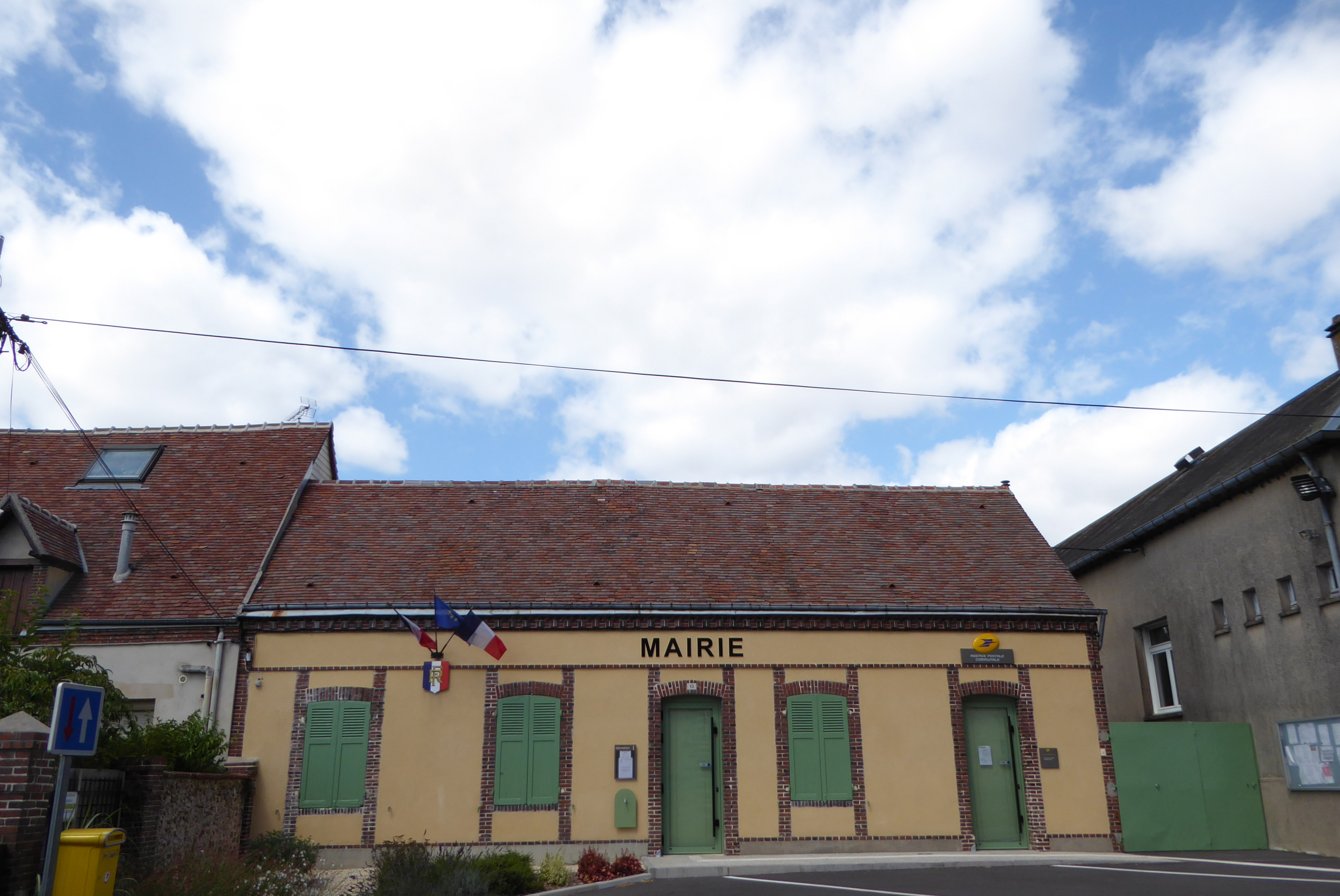 Mairie d'Happonvilliers, Eure-et-Loir (France).